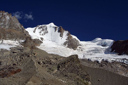 Gran Paradiso od chaty Chabod